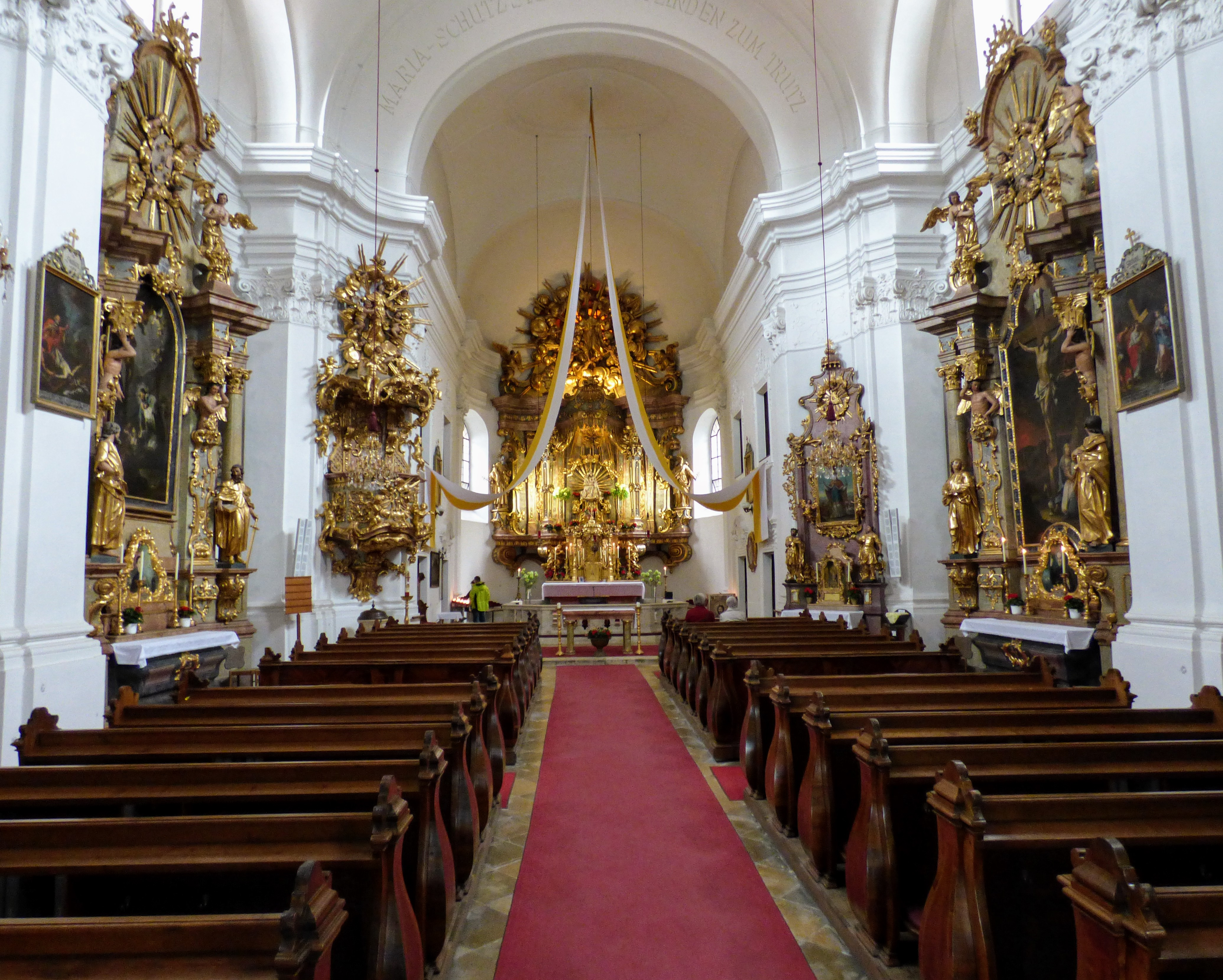 Inneres der Wallfahrtskirche Maria Schutz (Gemeinde Schottwien, NÖ)